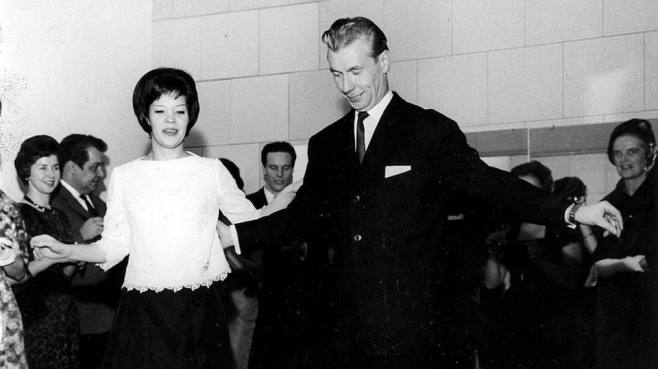 Suomalainen diplomitanssinopettaja ja opetusneuvos Åke Blomqvist (1925–2013) (oikealla) vuonna 1960 tanssimassa charlestonia.